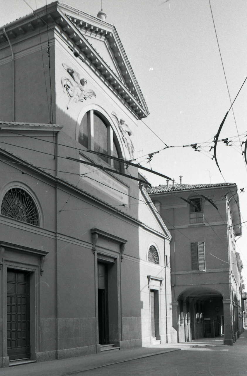 Servizio fotografico : Bologna, 1970 / Paolo Monti. - Strisce: 7, Fotogrammi complessivi: 32 : Negativo b/n, gelatina bromuro d'argento/ pellicola ; 35 mm. - ((I fotogrammi hanno una doppia numerazione. . - Sul portanegativi: Nikon Tri-x. - Fonte: Agenda di Paolo Monti: Monti - Agenda 1970 (1970), presso Archivio Paolo Monti